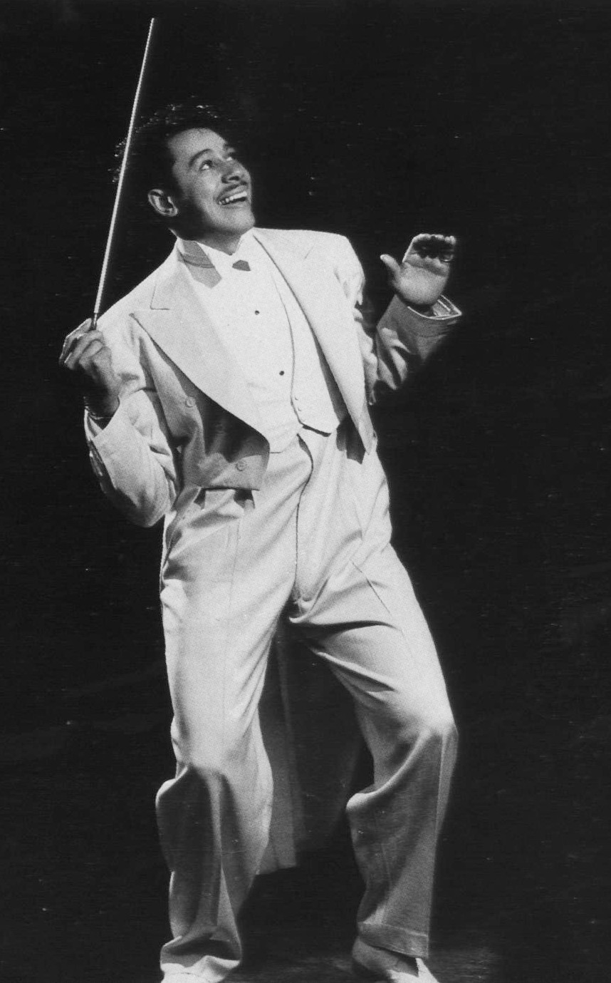 Cab Calloway